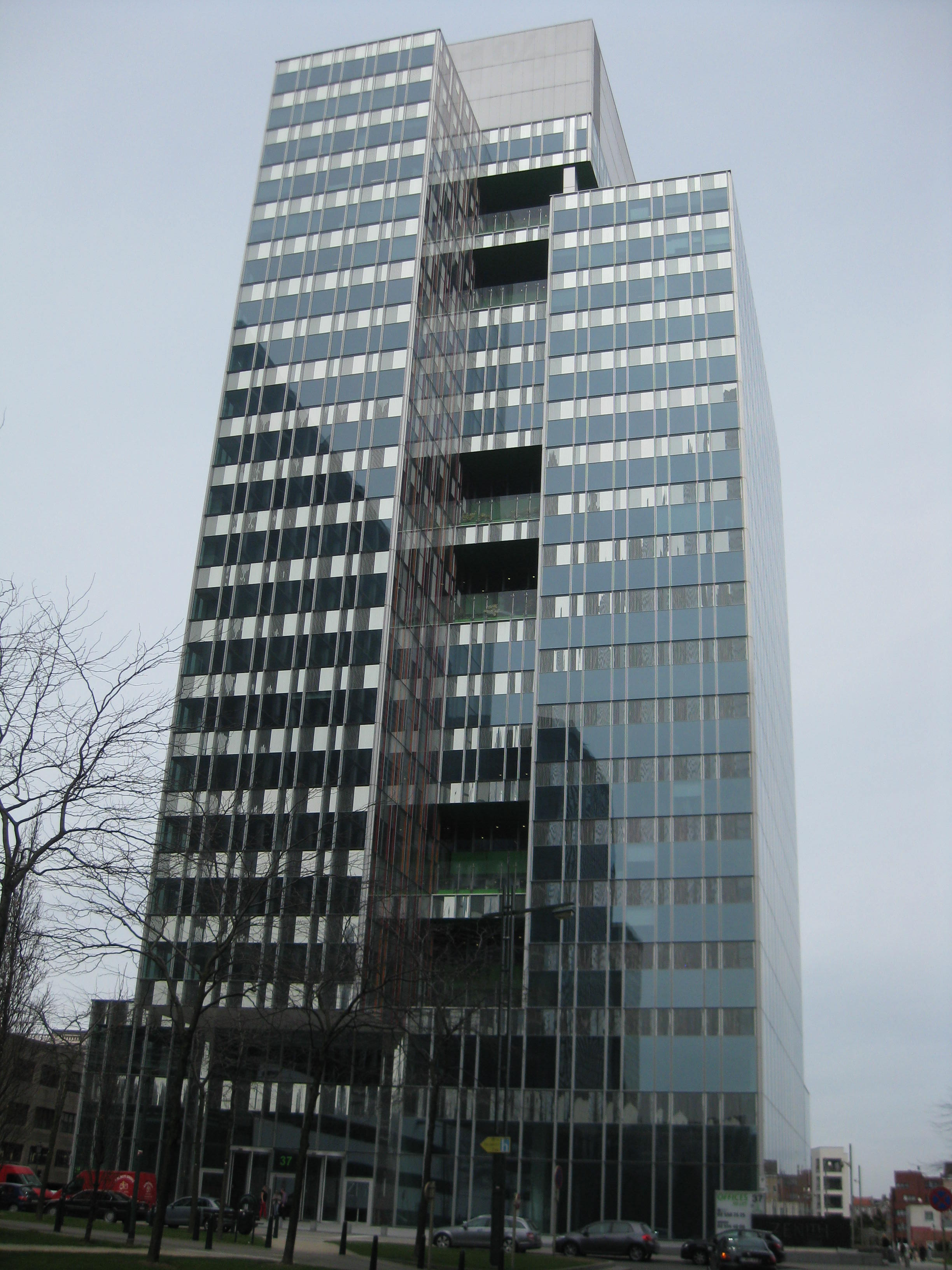 Tour Zénith